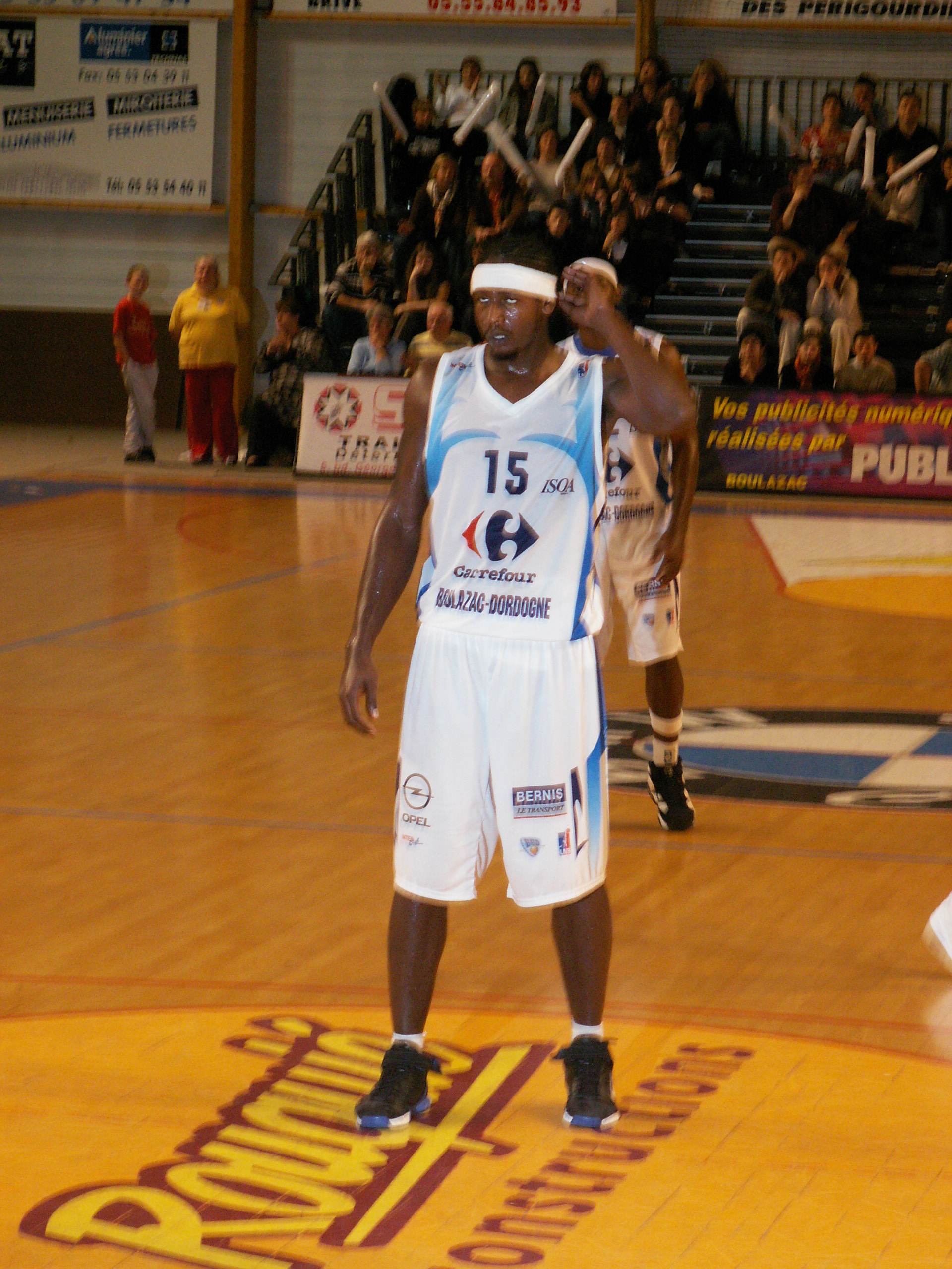 Kelvin HOWELL sous le maillot boulazacois (saison 2007-2008)